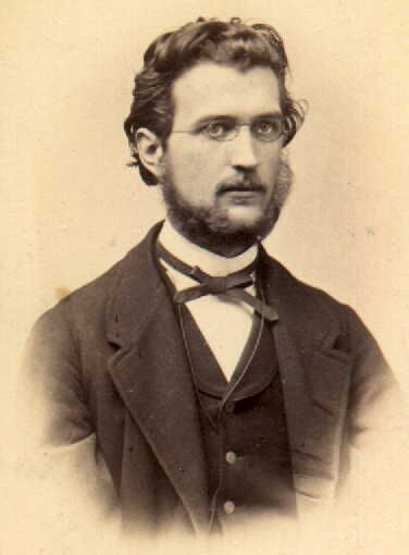 Prof. Dr. phil. Julius Lehr, deutscher Forstwissenschaftler und Nationalökonom (* 18. Oktober 1845 in Schotten, Vogelsberg, Großherzogtum Hessen; † 10. Oktober 1894 in München)